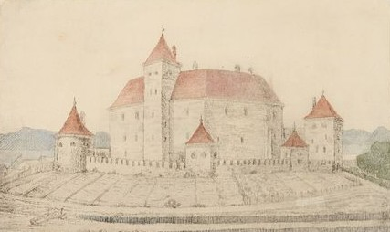 Kuusiston piispanlinna, Schjerfbeck Magnus, 1890-1925, Museovirasto